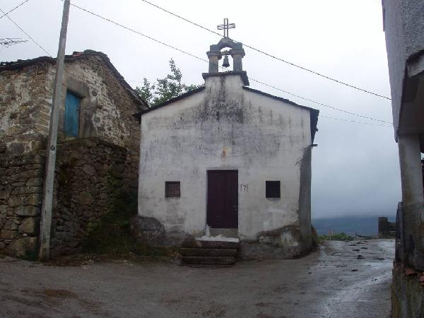 Foto da capela de Ardexarxe, parroquia de Fradelo, ayuntamiento de Viana do Bolo (provincia de Ourense).